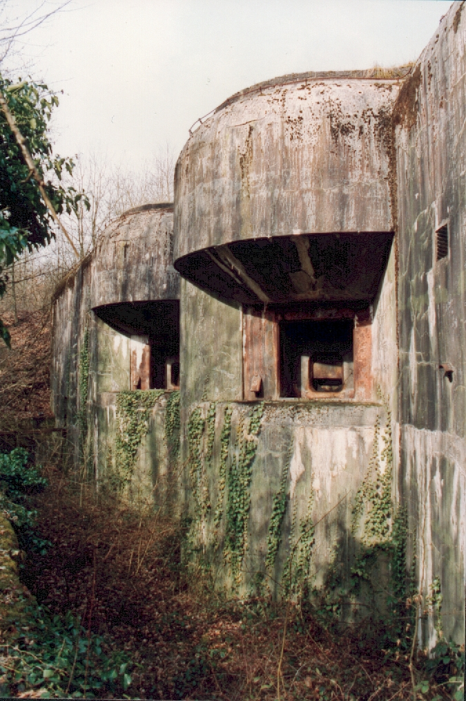 Artilleriekasematte, Artilleriewerk Billig, Block 5, Maginot-Linie